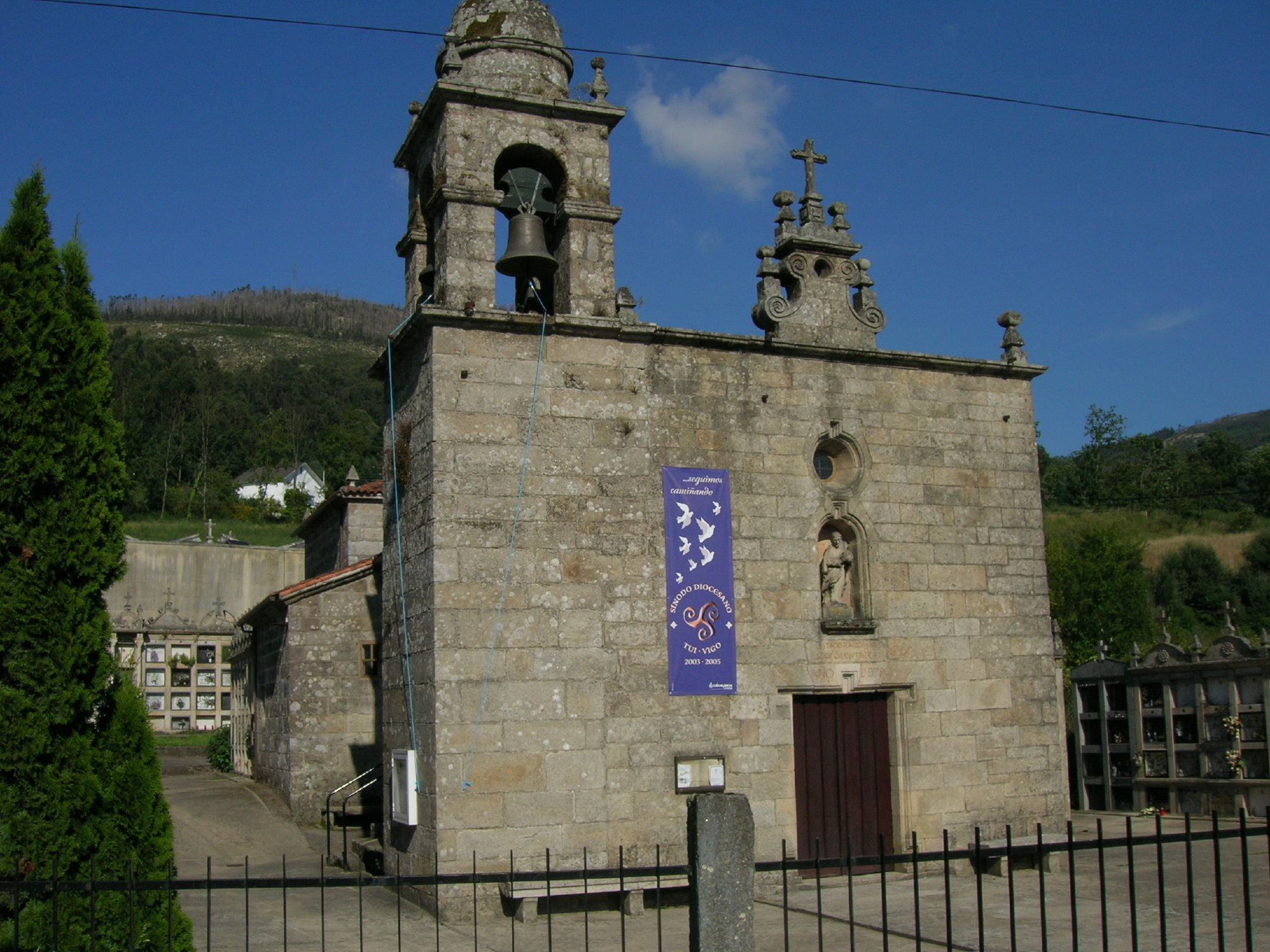 Iglesia románica del siglo XII y retocada en el siglo XIII. Su primitiva fabrica sufrió importantes cambios hacia finales del siglo XVIII con motivo de las reformas llevadas a cabo en su estructura. De la época románica tan solo conserva restos en los muros laterales, sobresaliendo los diferentes canecillos que anteceden el alero y la cornisa.